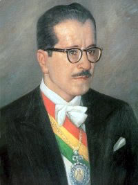 Hernán Siles Zuazo, presidente de Bolivia (1956-1960, 1982-1985)